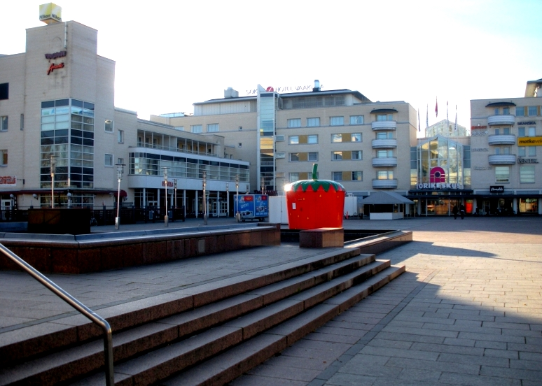 Torikeskus Seinäjoella